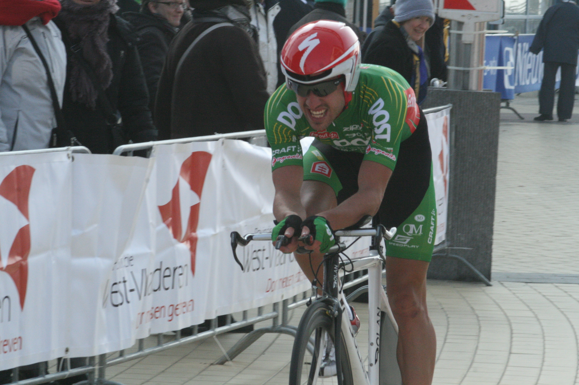 Driedaagse van West-Vlaanderen 2011, proloog in Middelkerke